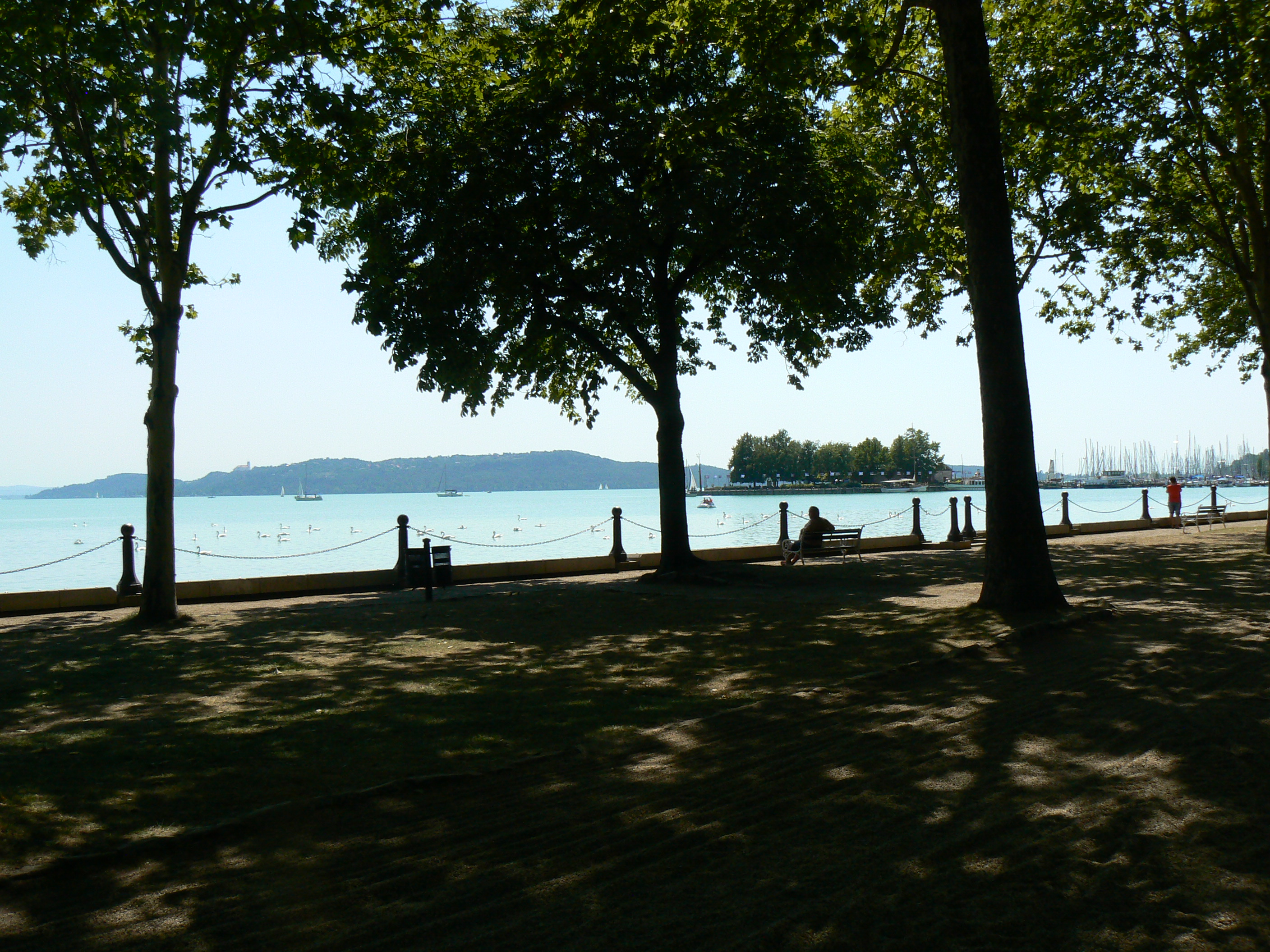 A felvétel 2013. augusztus 6 -án készült Balatonfüreden. Tagore sétány. ©© Derzsi Elekes Andor, Budapest, 2013, You are authorised to use these photos and vids under Creative Commons – even for commercial, for profit purposes. Photos must be attributed to Derzsi Elekes Andor. All of the photos and vids in the Metapolisz DVD line are under Creative Commons and can be used even for commercial – for profit – purposes. Recommended Citation Derzsi Elekes Andor: Metapolisz DVD line